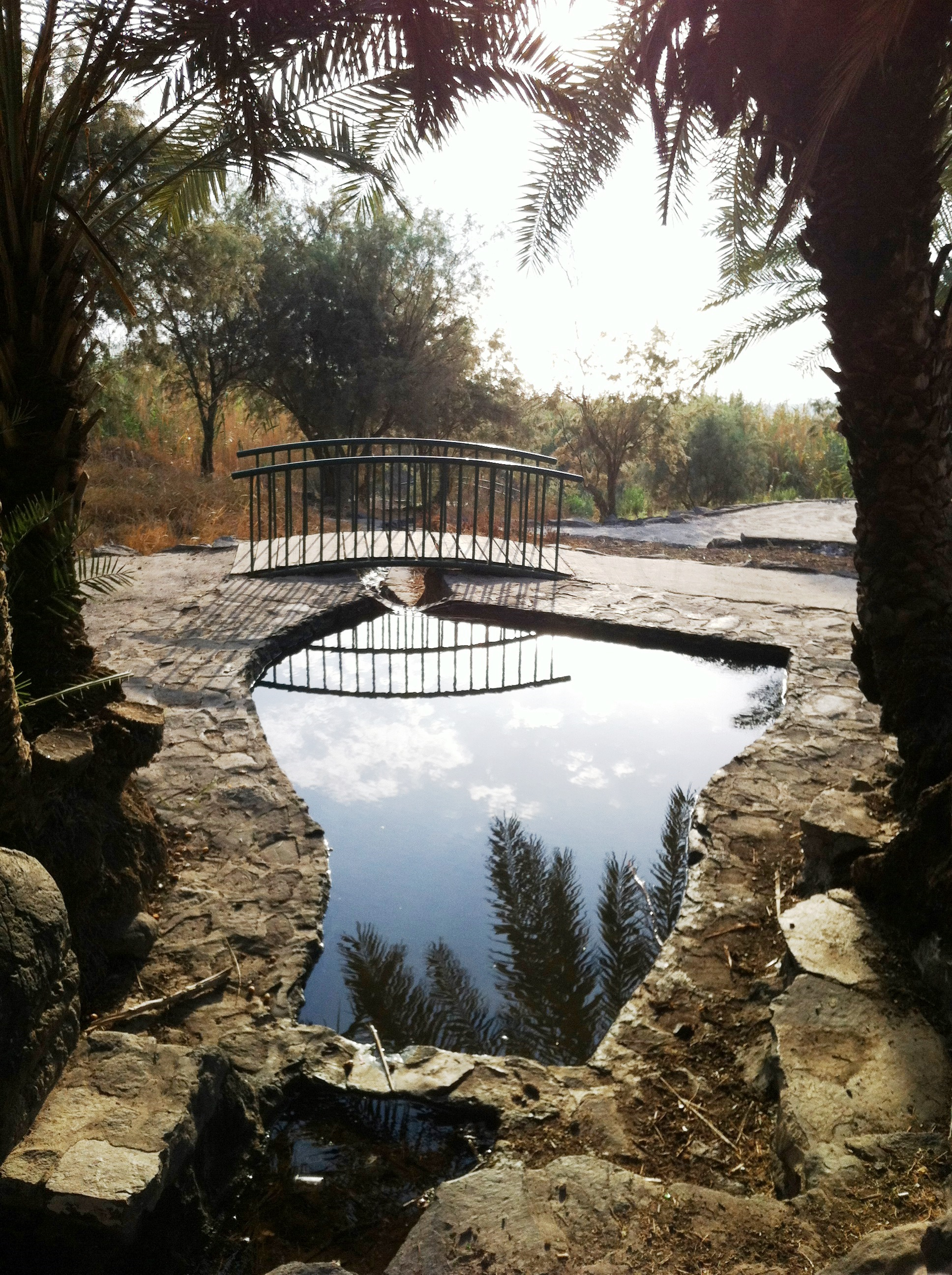 הבריכה בעין פוריה